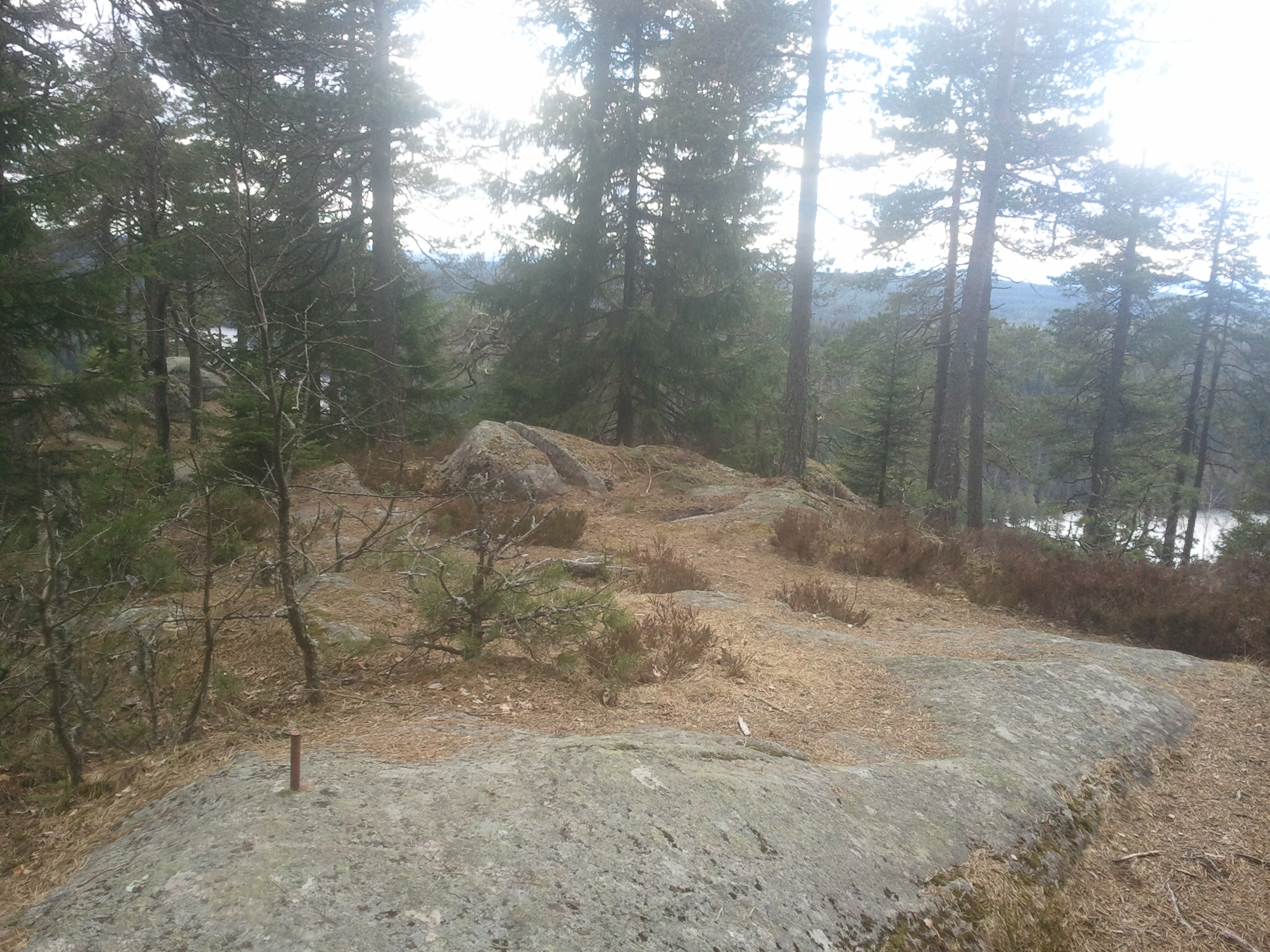 Tonekollen med bolten på toppen. Tonevannet nedenfor til høyre, Mosjøen skimtes mellom trærne til venstre.